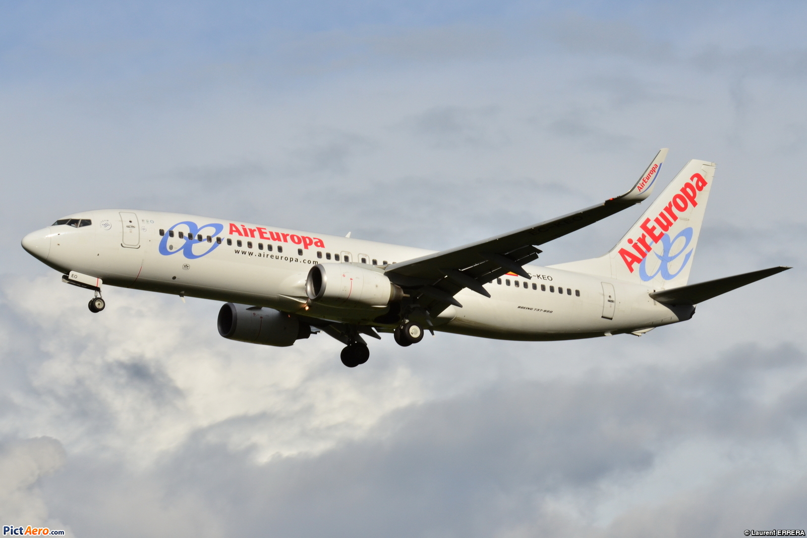 Photo prise à l'aéroport de Toulouse-Blagnac (LFBO) en France. Picture take at Toulouse-Blagnac Airport (LFBO) in France.